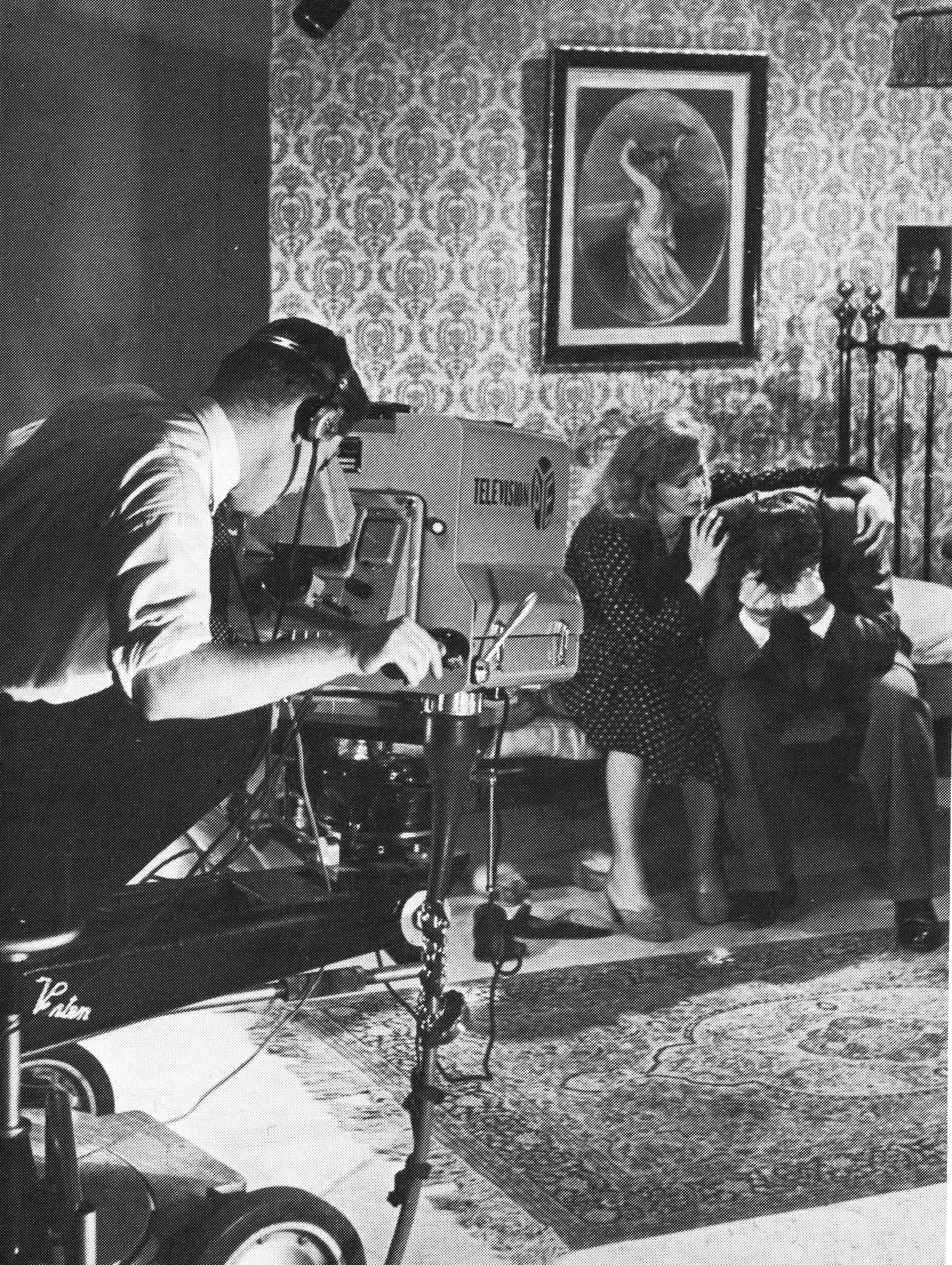 Bildtext i Hört och sett: radio och television 1925-1974 (1974) s. 177: "Första tv-teaterföreställningen i Sverige ägde rum på Liseberg den 20 maj 1950 med O'Neills 'Hopsvetsade' och med Ingrid Borthen – Bertil Anderberg."